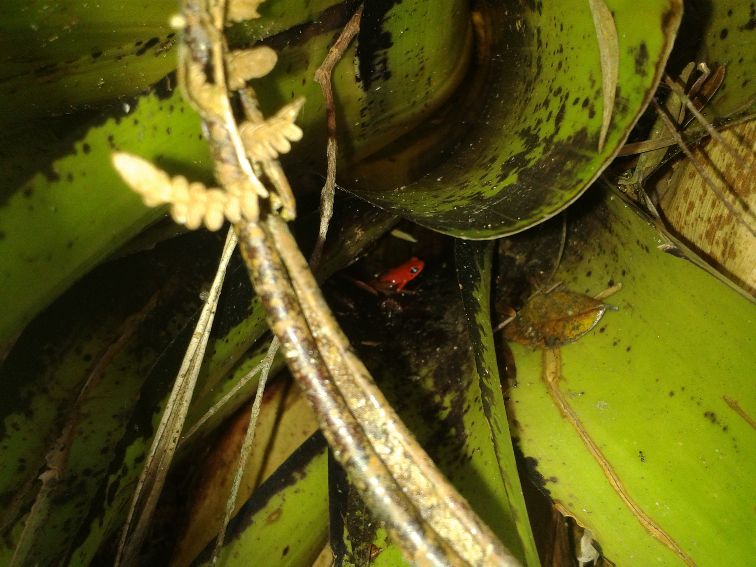 Rana roja (Ranitomeya daleswansoni) especie endémica del Parque nacional natural selva de florencia.